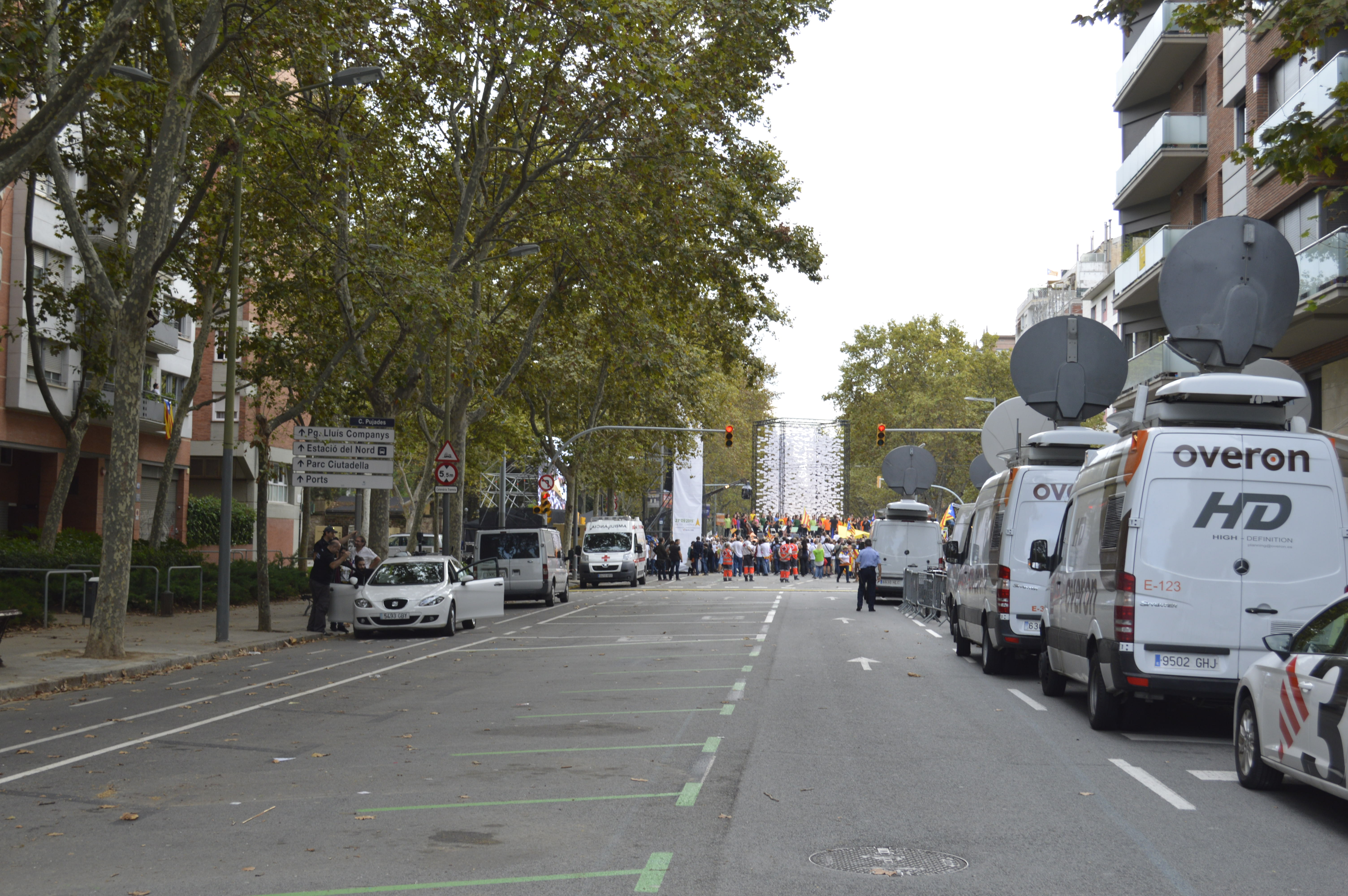 Via Lliure 2015 a la Meridiana. Fotos de Toniher